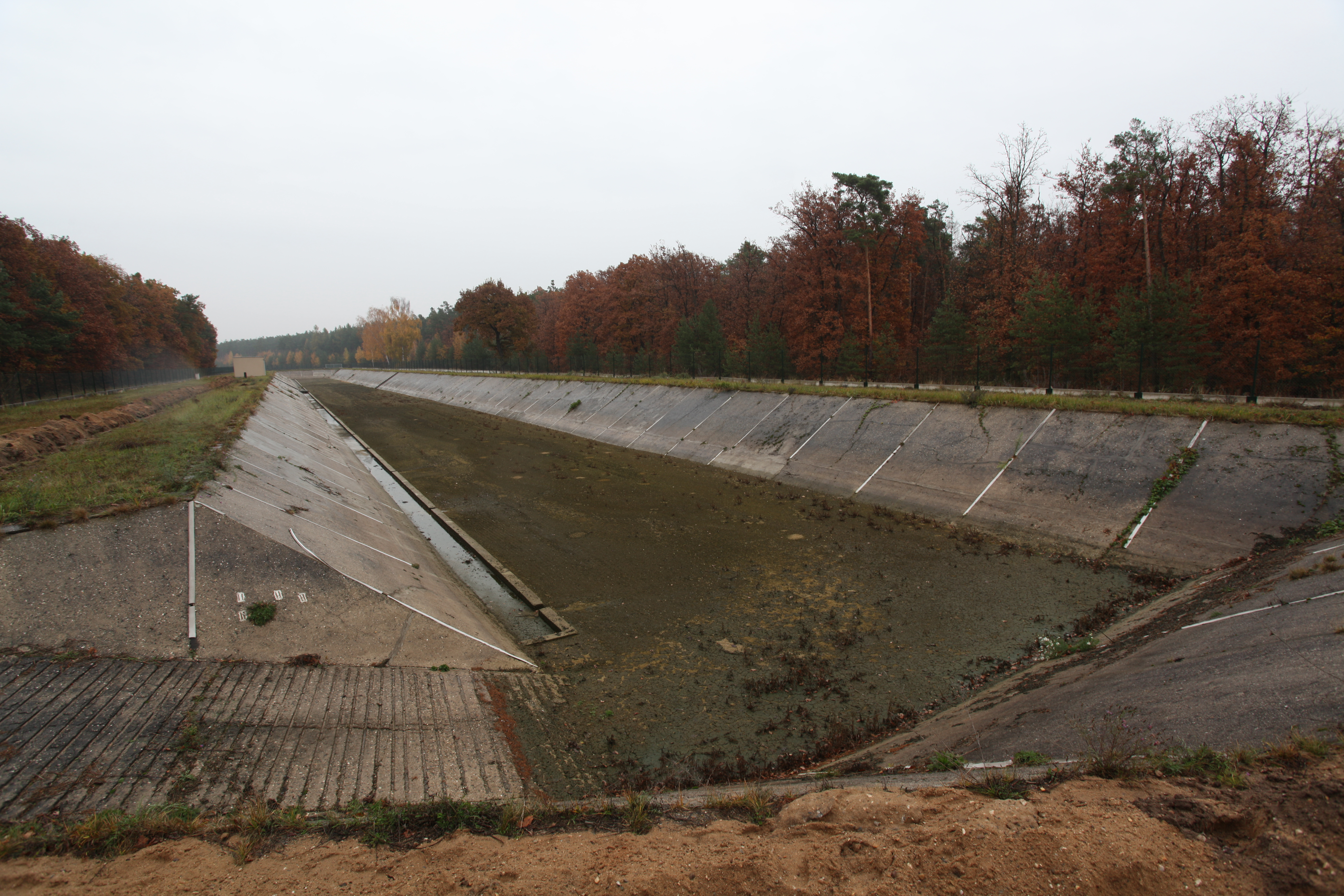 Pohled na vsakovací nádrž umělé infiltrace v úpravně vod v Káraném. Tmavá barva na dně nádrže jsou nečistoty. Pod nečistotami se nachází písek. Každý rok dochází k mechanickému odstraňování těchto usazených nečistot. Umělá infiltrace funguje na principu filtrování vody, z řeky Jizery pískovým podložím na sever od Káraného. Voda je načerpána a dále přefiltrována na pískových rychlofiltrech. Poté je dopravena do vsakovacích nádrží. Zde postupně zasakuje a čistí se. V okolí vsakovacích nádrží se nachází studny umělé infiltrace, ze kterých se přefiltrovaná voda vyčerpává pod tlakem a potrubím dopravuje k dalšímu ošetření chlórem. Princip umělé infiltrace byl v Káraném zaveden v roce 1968 a jeho kapacita je 700-900 l/s. Zdržení je asi 40 dní. Mocnost zdejších štěrkopísků je 8-12 m. Podobných vsakovacích nádrží se v Káraném nachází 15. Zdroje: Křivánek, Oldřich a Kněžek, Miroslav. 2001. Zdroje pitné vody v Káraném. Principy získávání vody v oblasti káranské vodárny. Pražské vodovody a kanalizace a.s.